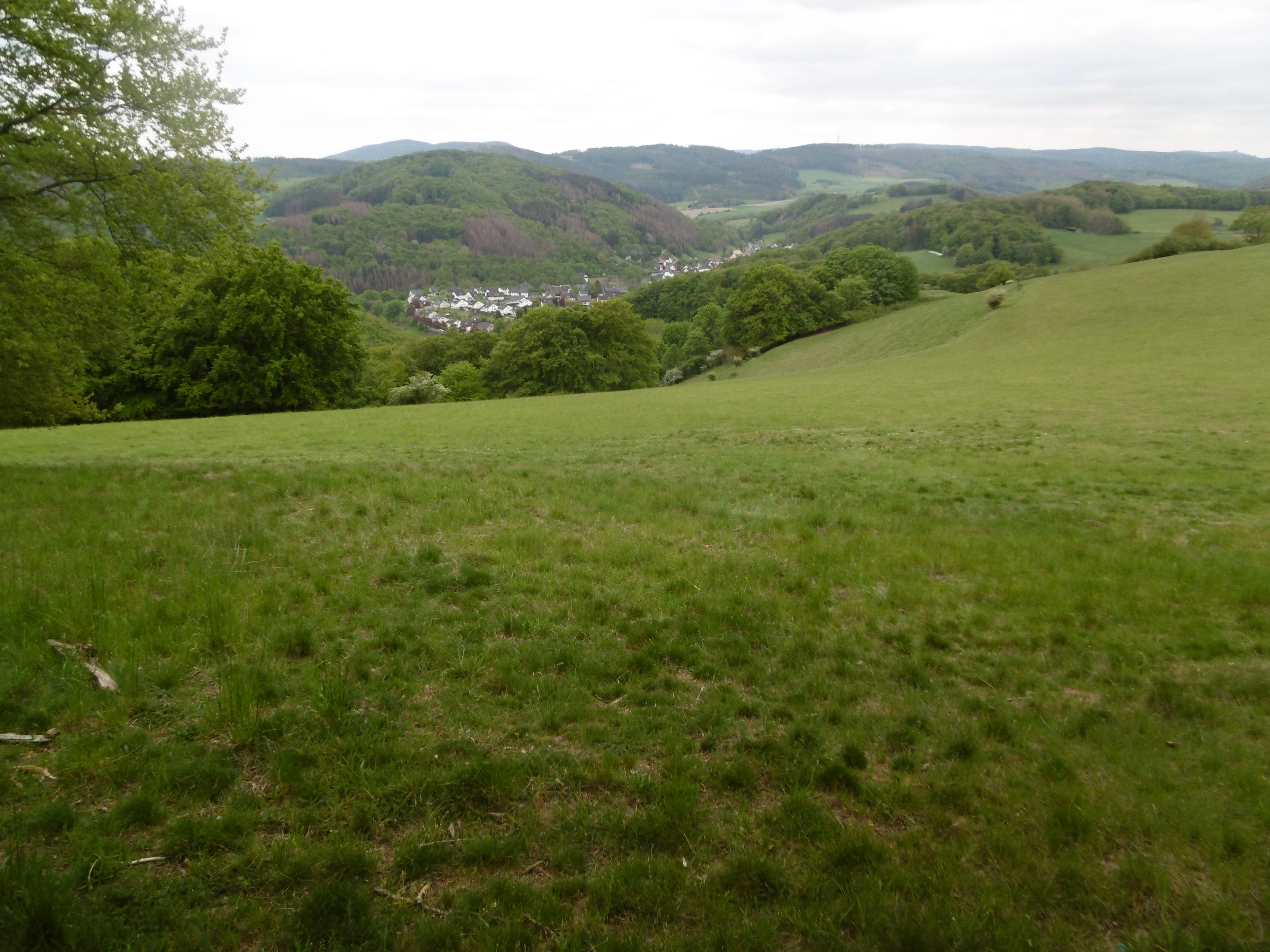 Naturschutzgebiet Egge (Brilon) vom Weg an der Hütte am Nordostrand. Im Tal Messinghausen und Wald mit Grünland in Landschaftsschutzgebieten.